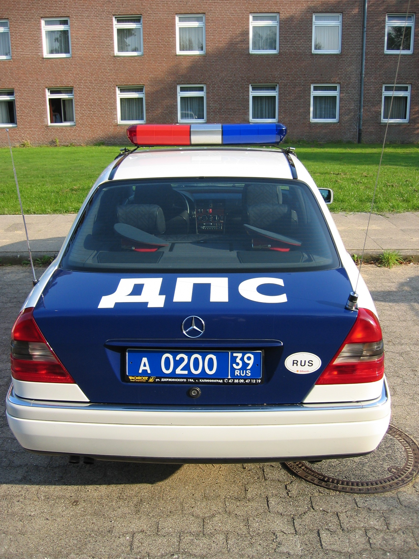 Russische politie auto